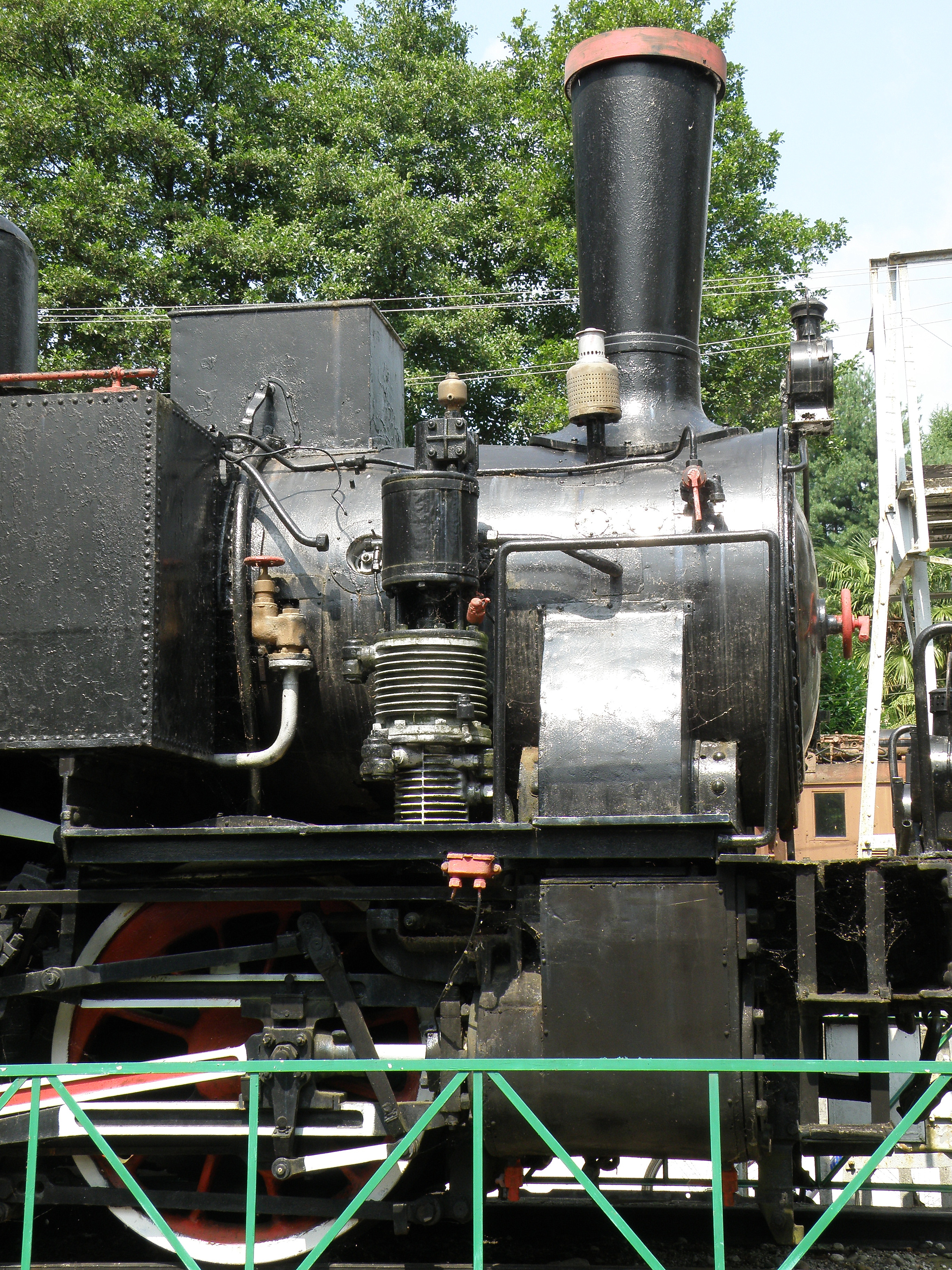 Musée des Transports Francesco Ogliari (en it. Museo europeo dei trasporti Ogliari), à Ranco, dans la prov. lombarde de Varèse, sur la rive orientale du lac Majeur.